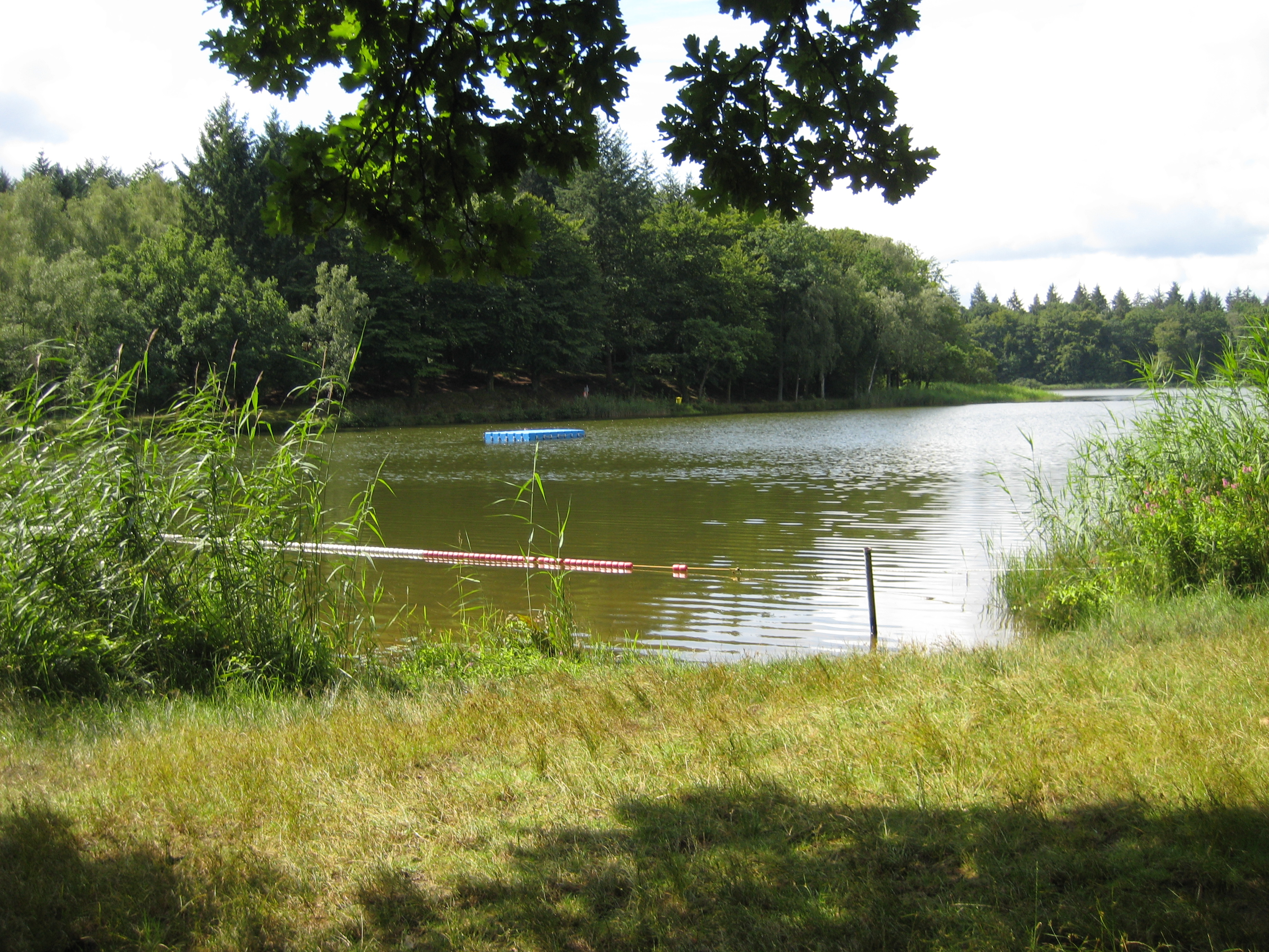 Bredenbeker Teich, Badebereich